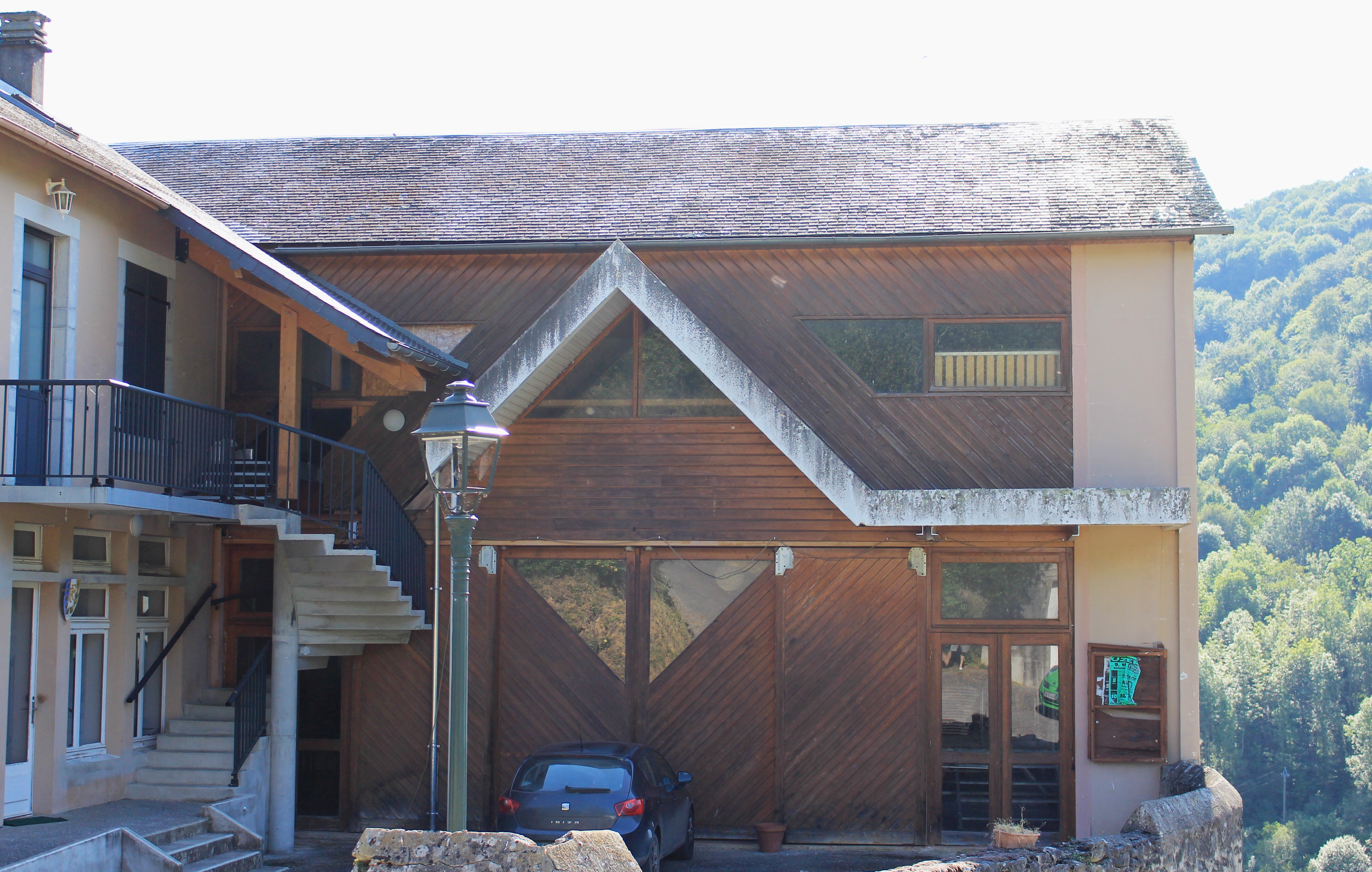 Salle des fêtes de Banios (Hautes-Pyrénées)